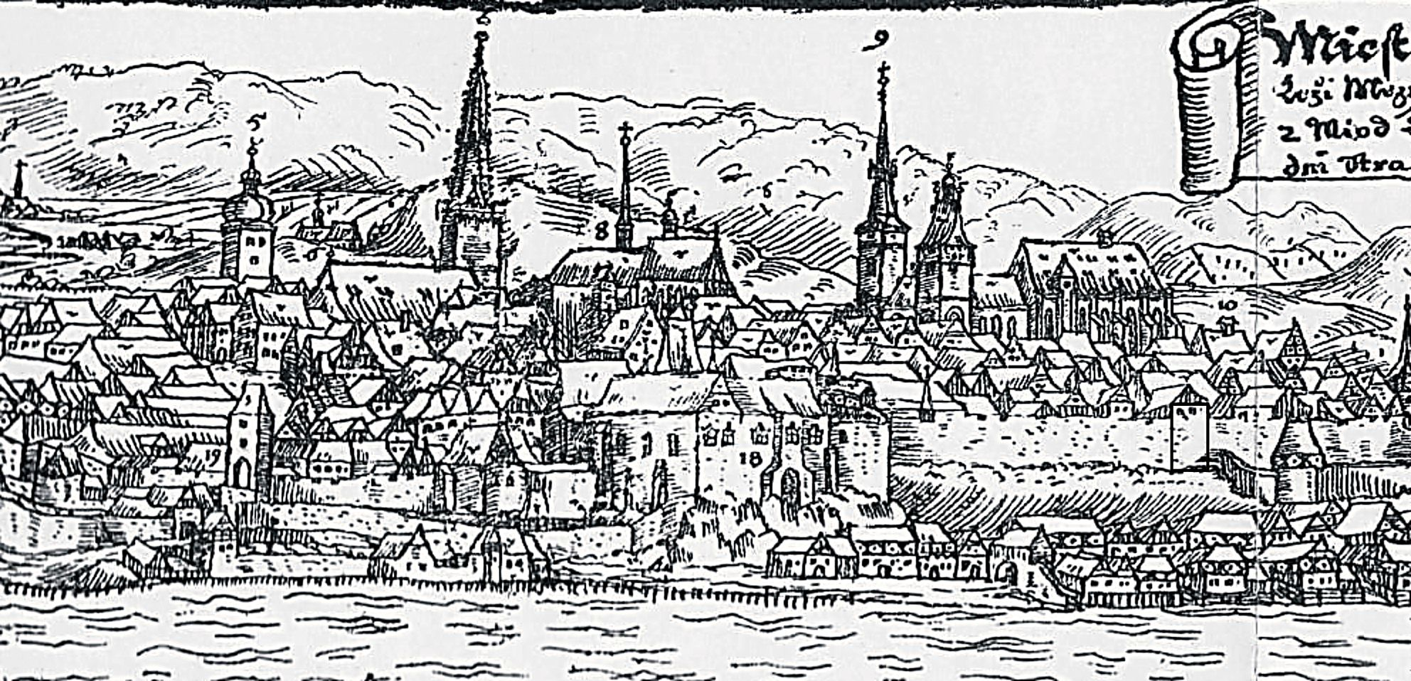 Jan Willenberg: veduta města Kadaně, detail